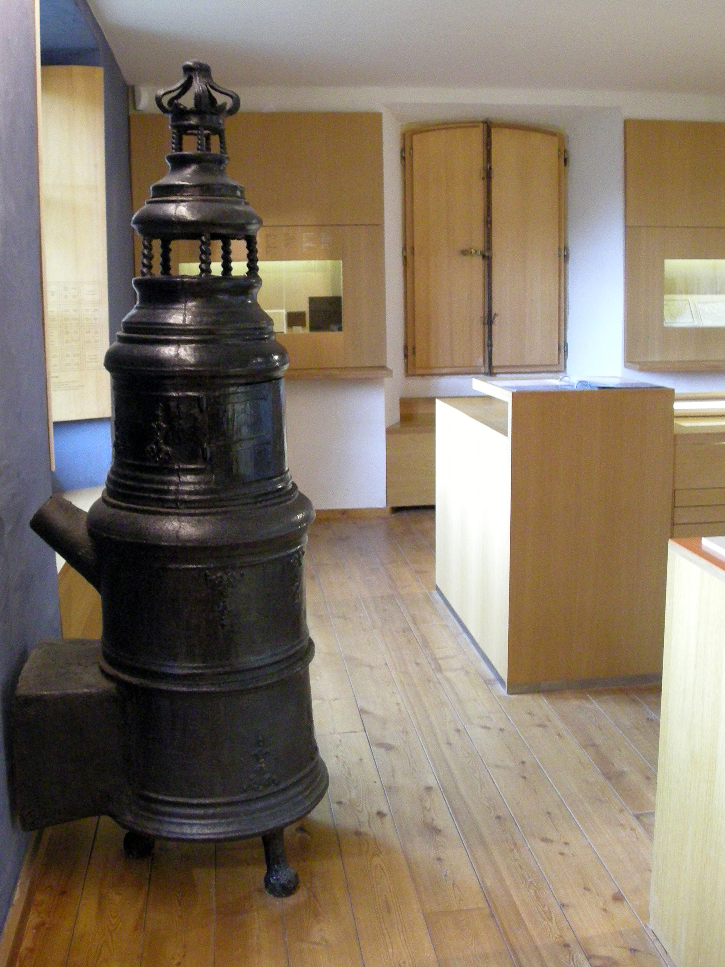 Ancien poêle, dit "poêle à tricoter", au Musée Jean-Frédéric Oberlin (Waldersbach, Bas-Rhin).